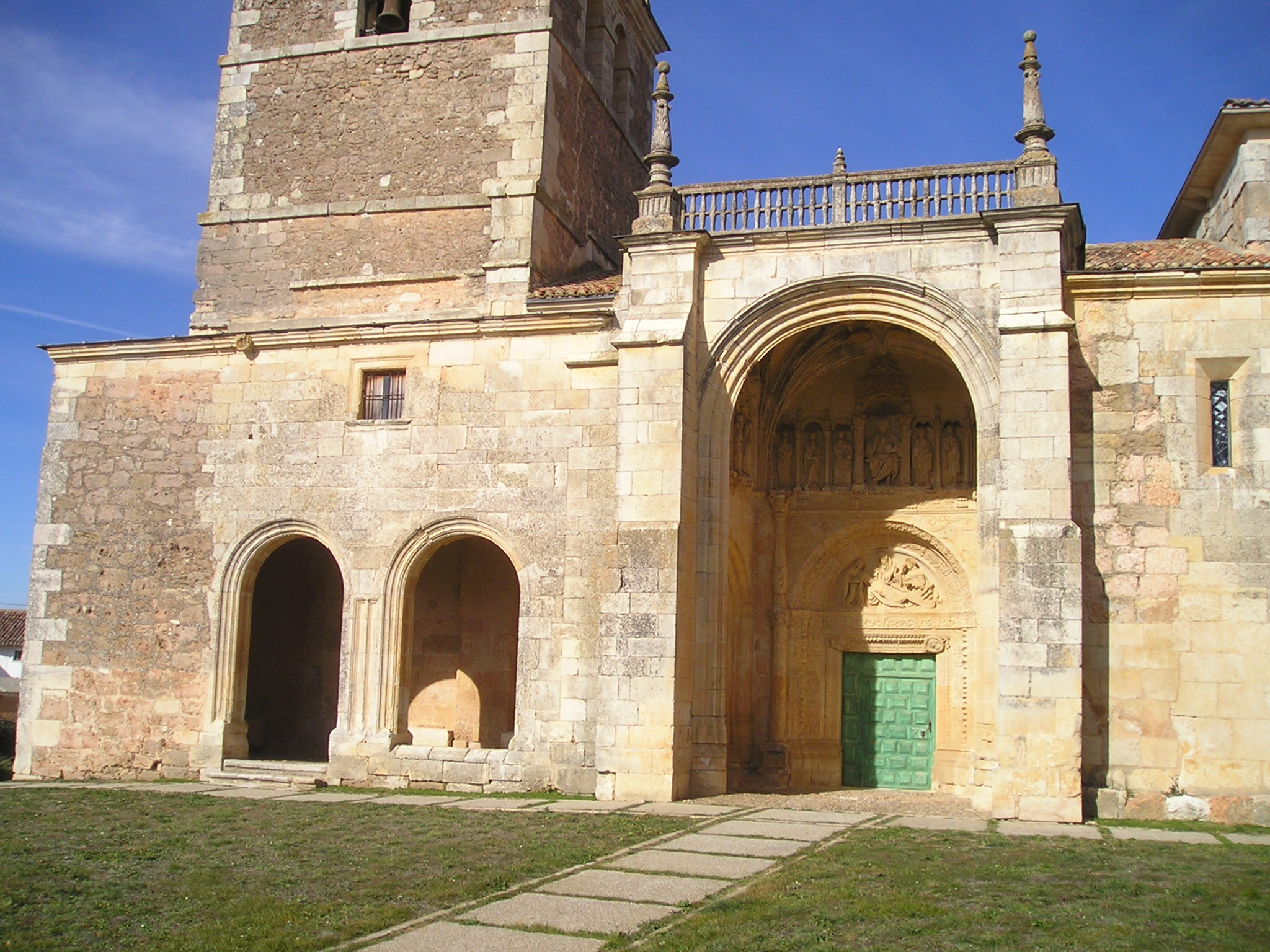 Portada del XVI.